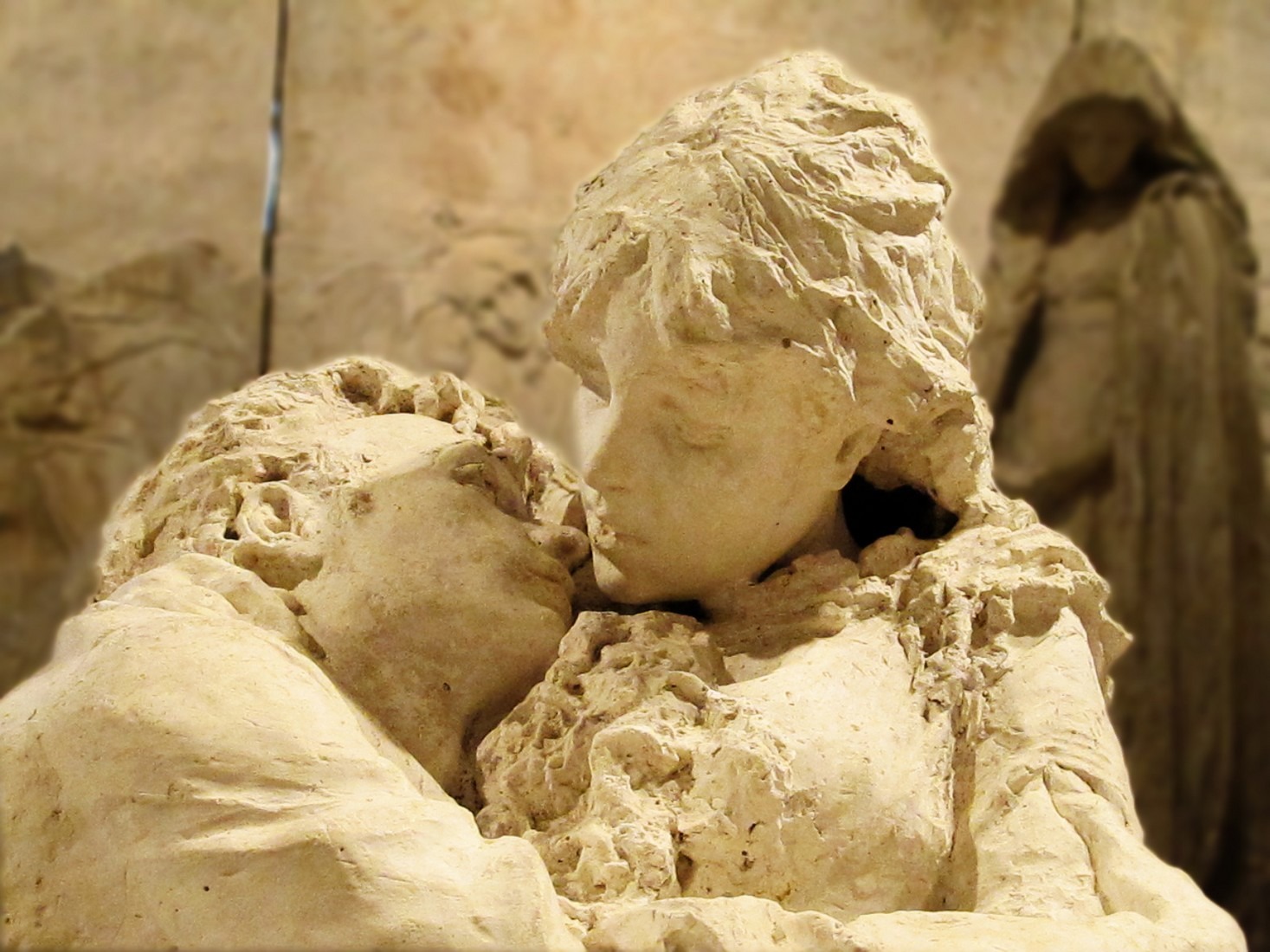 Particolare dell'opera in gesso di Leonardo Bistolfi all'ingresso dell'omonima gipsoteca di Casale Monferrato